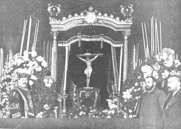 La capilla ardiente de Práxedes Mateo Sagasta en el Congreso, de Compañy. Fotografías de Manuel Compañy.